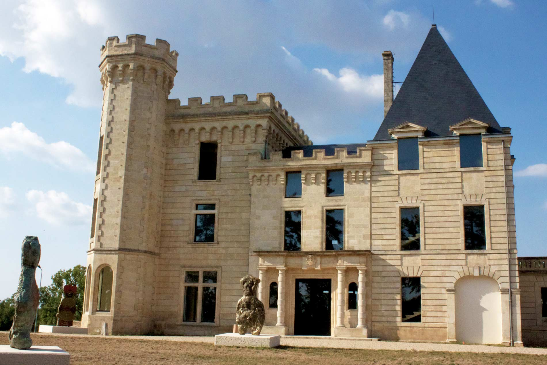 Château de Lormont ou château des Archevêques (Lormont, Gironde, France) .